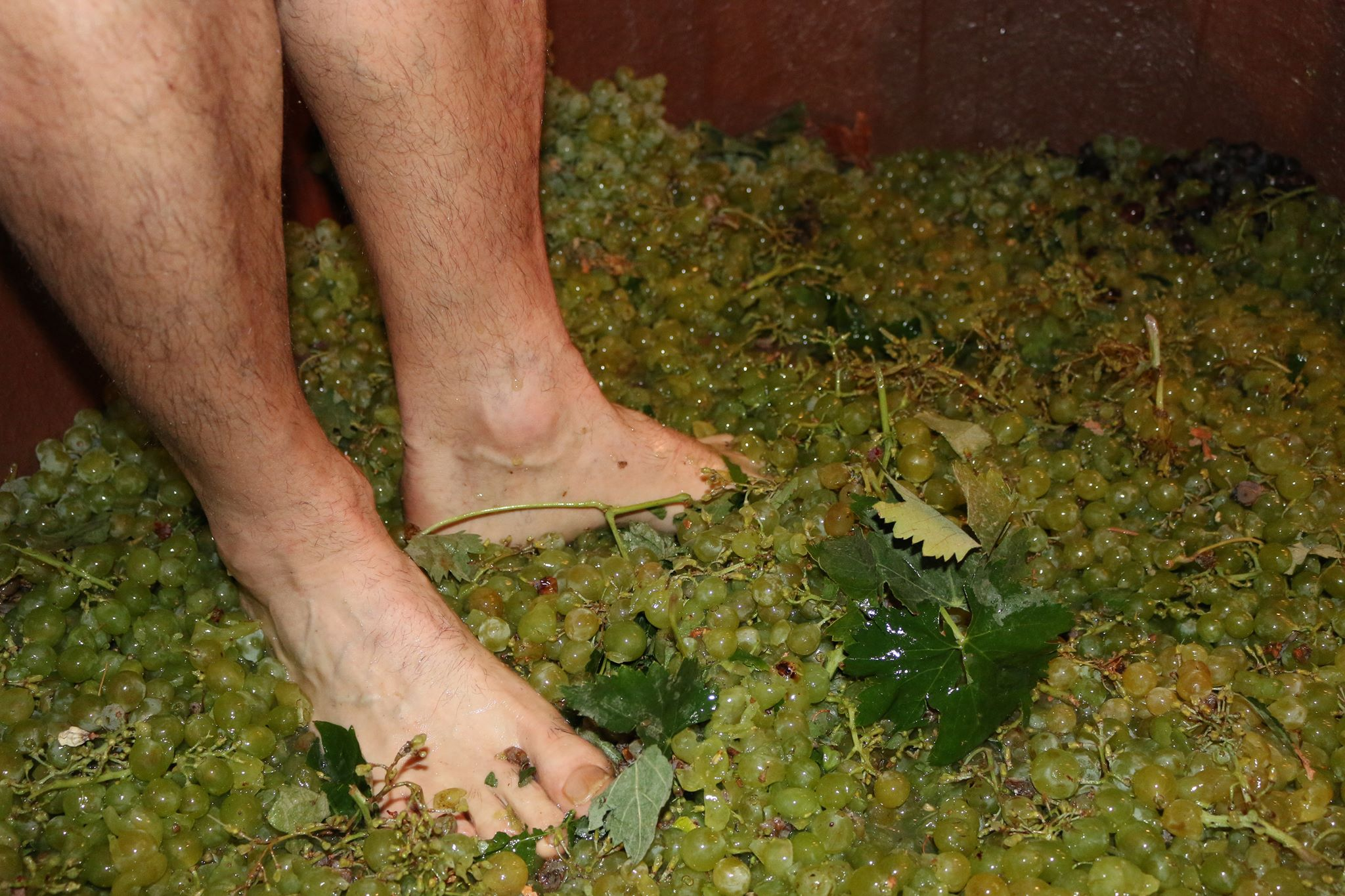 Vendimia Tradicional This is a photography of a Folklore festival in Spain (Wikidata id Q23662044).